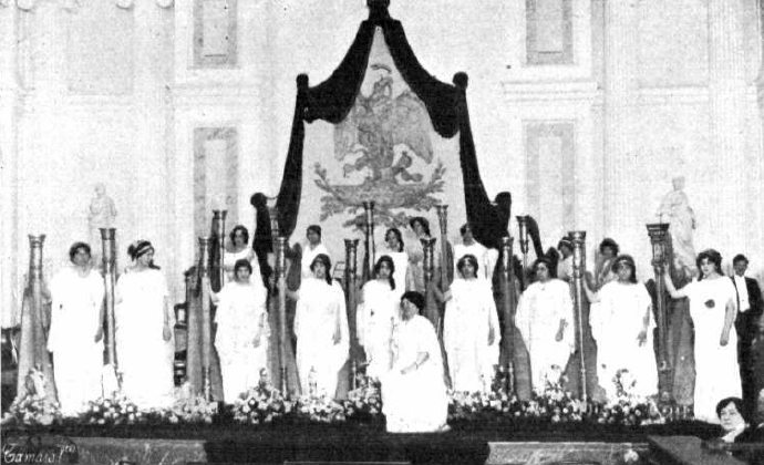 Fotografía publicada en 1914 que muestra a la arpista española Esmeralda Cervantes rodeada de sus alumnas del Conservatorio de México durante un concierto